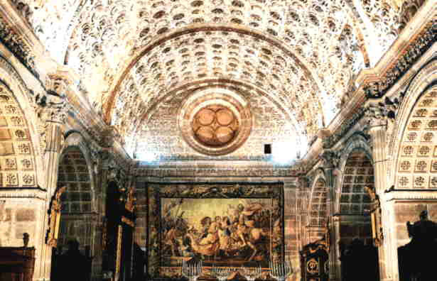 Boveda de las Cabezas.